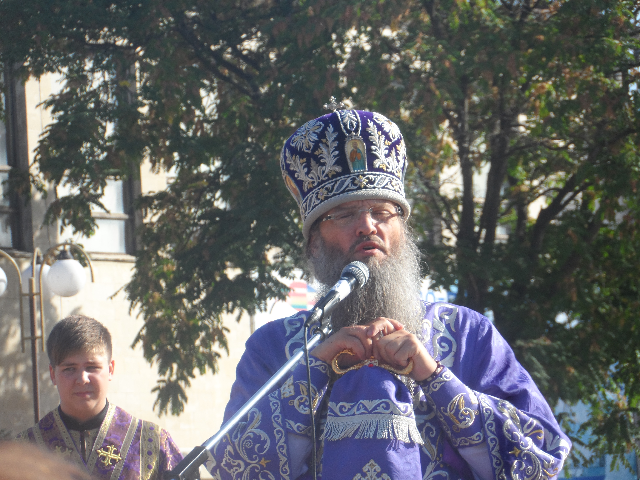 литургия